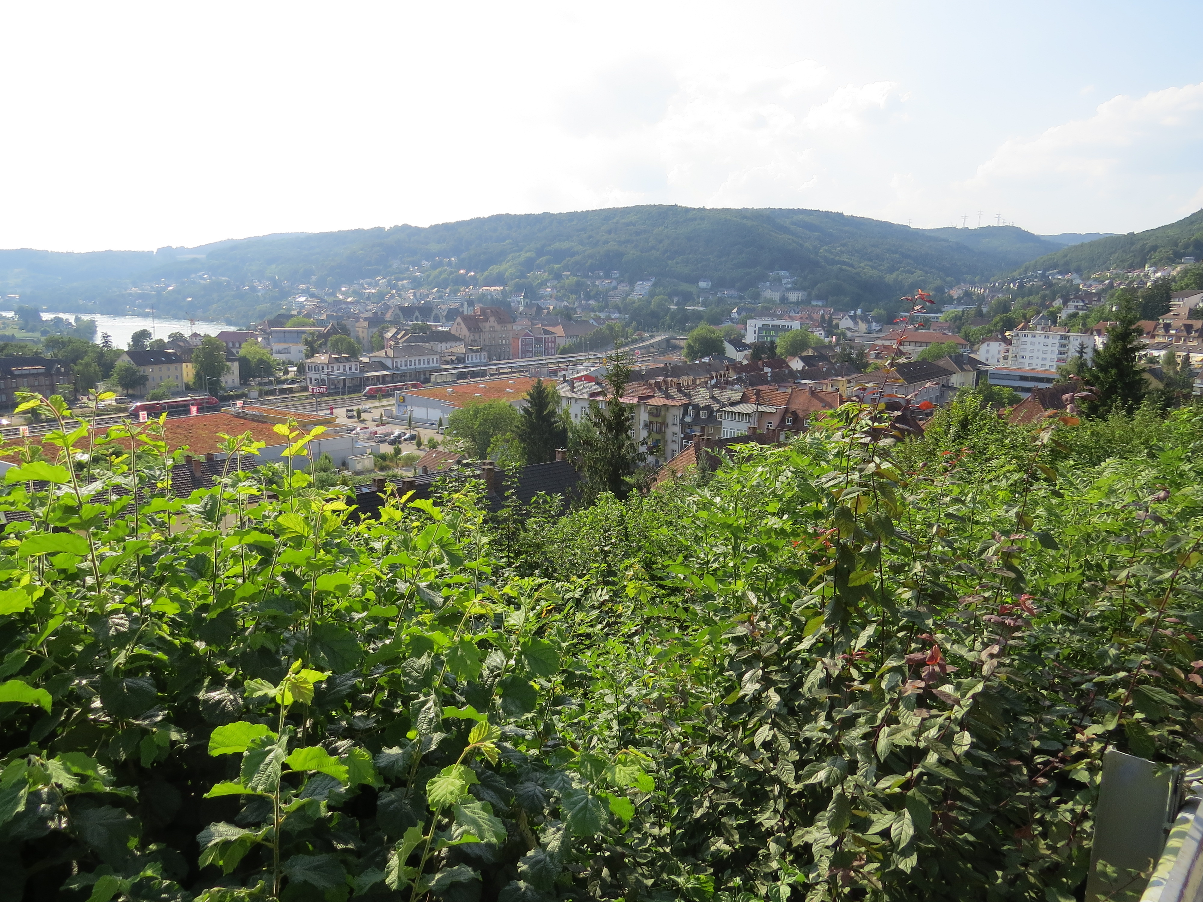 Waldshut von Osten